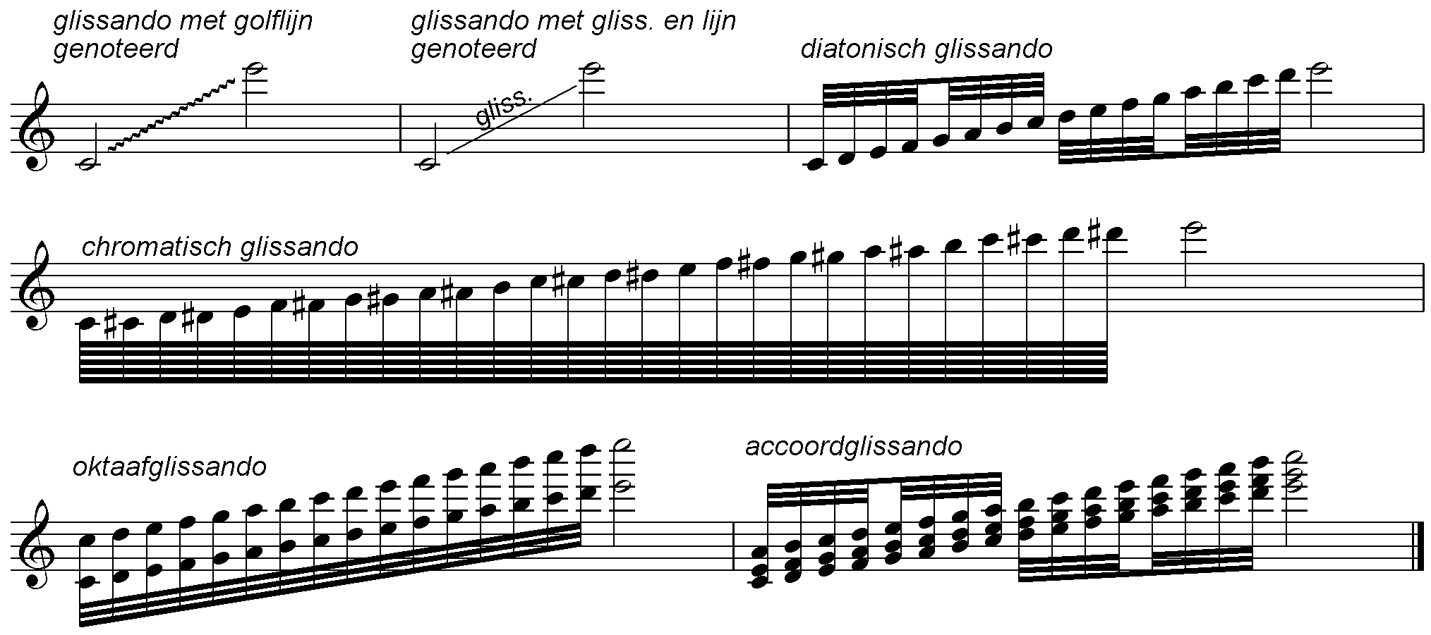 Glissando.